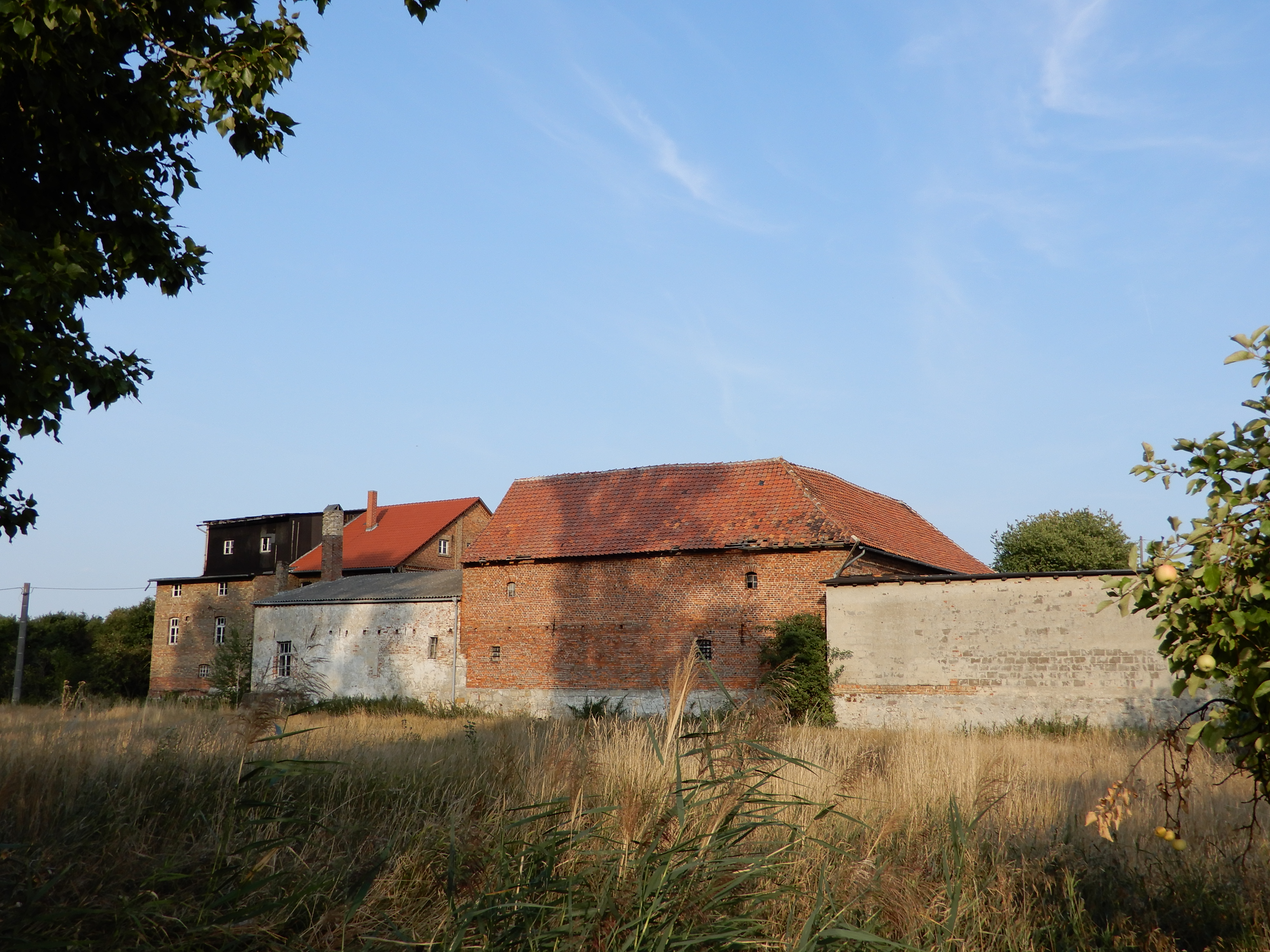 Blick auf die Untere Bruchmühle (Westerhausen)